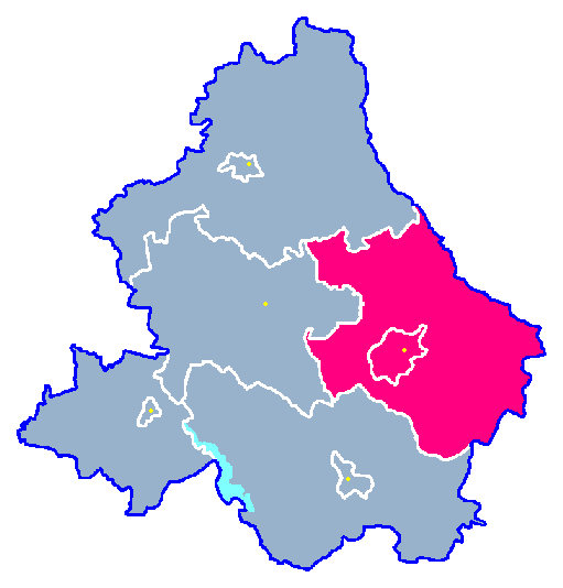 Locator maps for communes in województwo zachodniopomorskie : Łobez gm.png (podział na gminy)